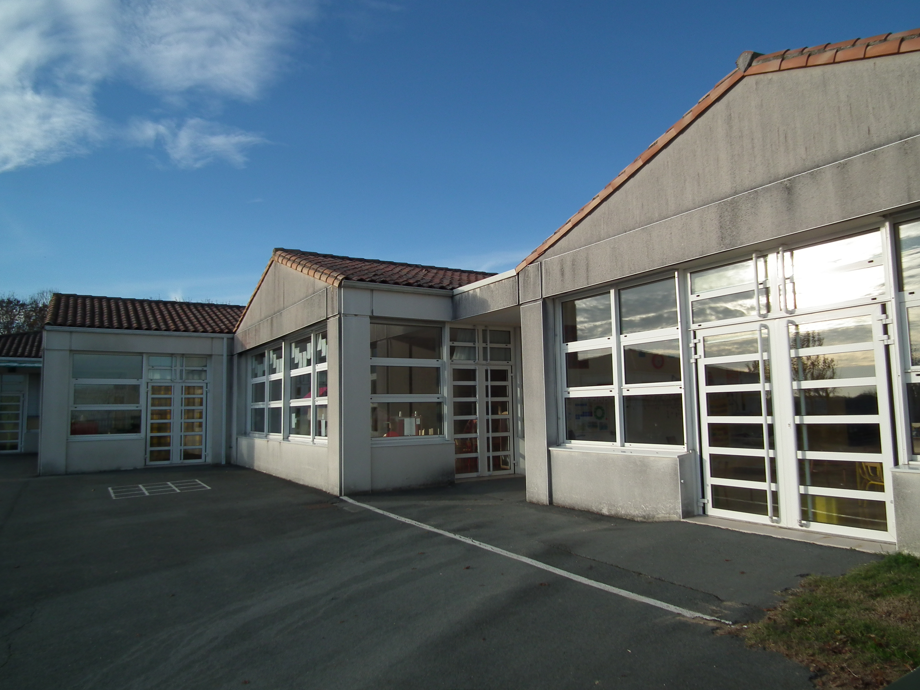 Le groupe scolaire d'Arvert